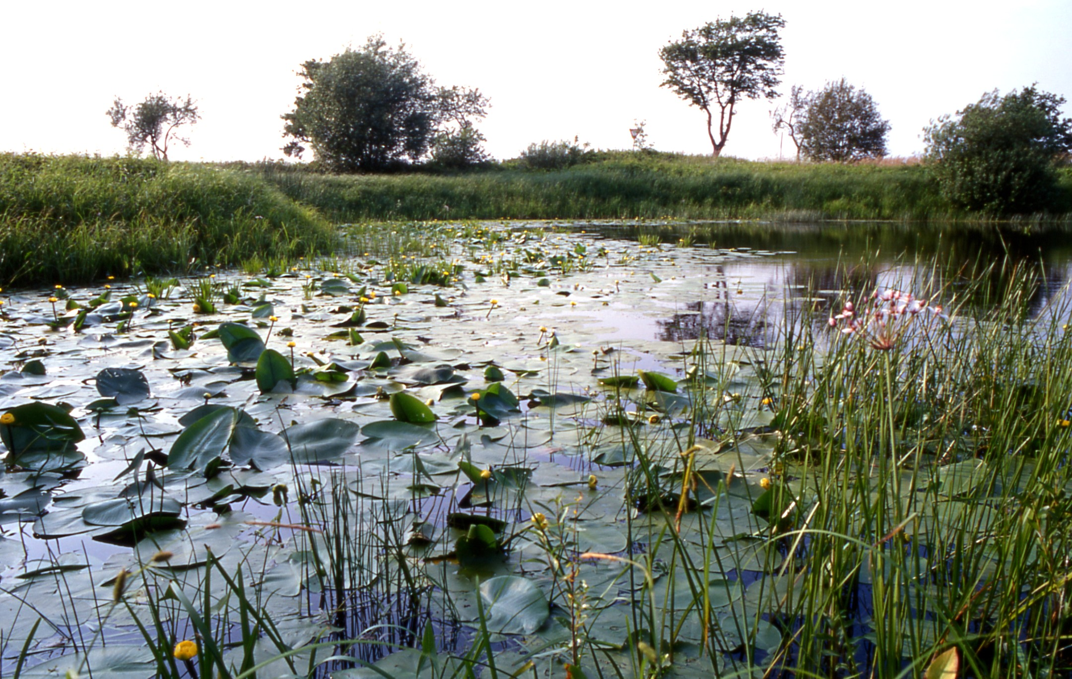 Vegetationsreiches Stillgewässer (ein sog. "Brack") in der Elbtalniederung. An Pflanzen erkennt man u. a. die Gelbe Teichrose, die Schwanenblume und die Krebsschere.